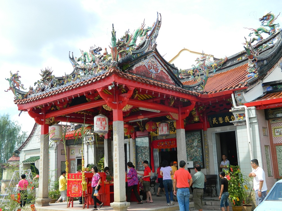 Hong San Si 鳯山寺